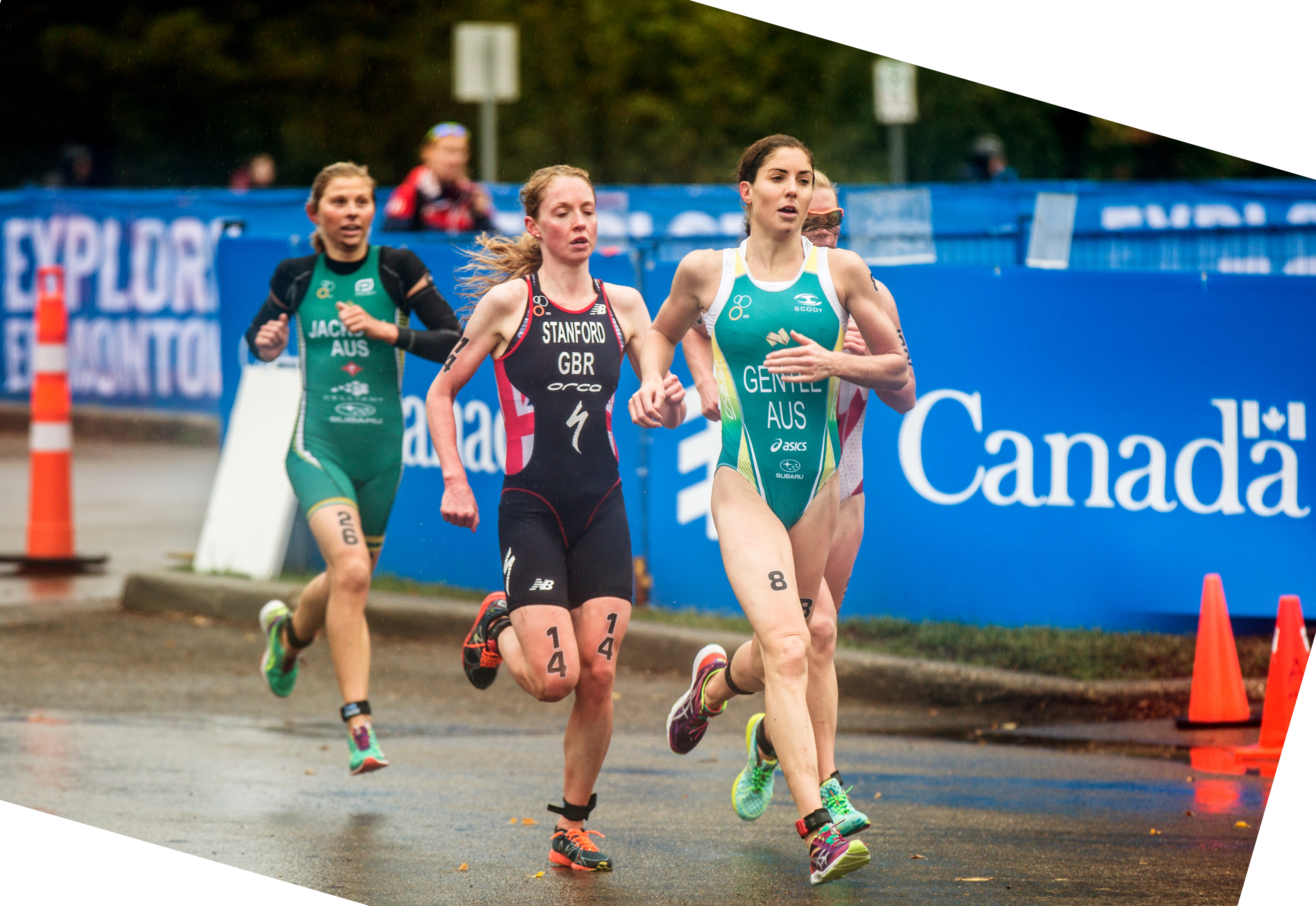 Non Stanford